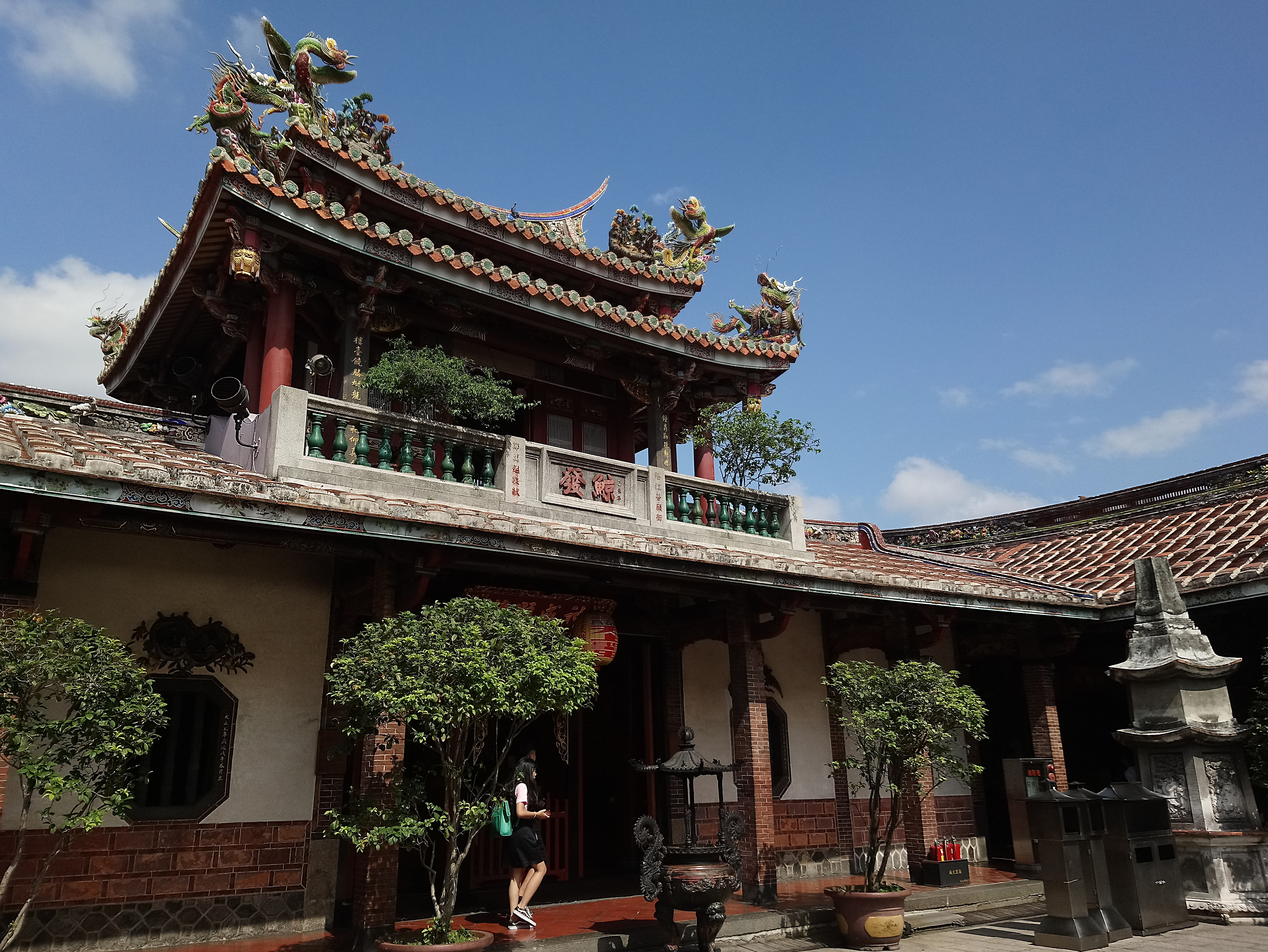 大龍峒保安宮鐘樓,臺北市大同區大龍次分區保安里